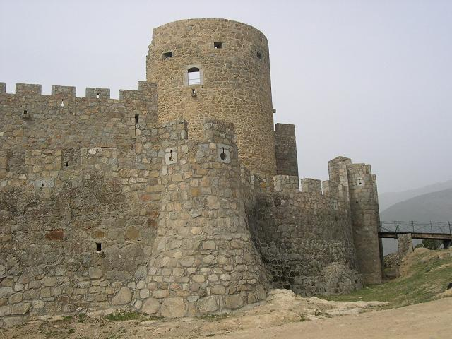 Castillo de La Adrada, Avila, España.